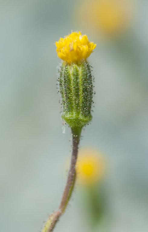 Layia discoidea